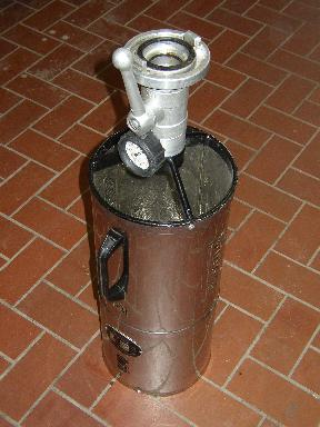 Feuerwehr Mittelschaumrohr Lizenz: GNU-FDL Bild selbst fotografiert